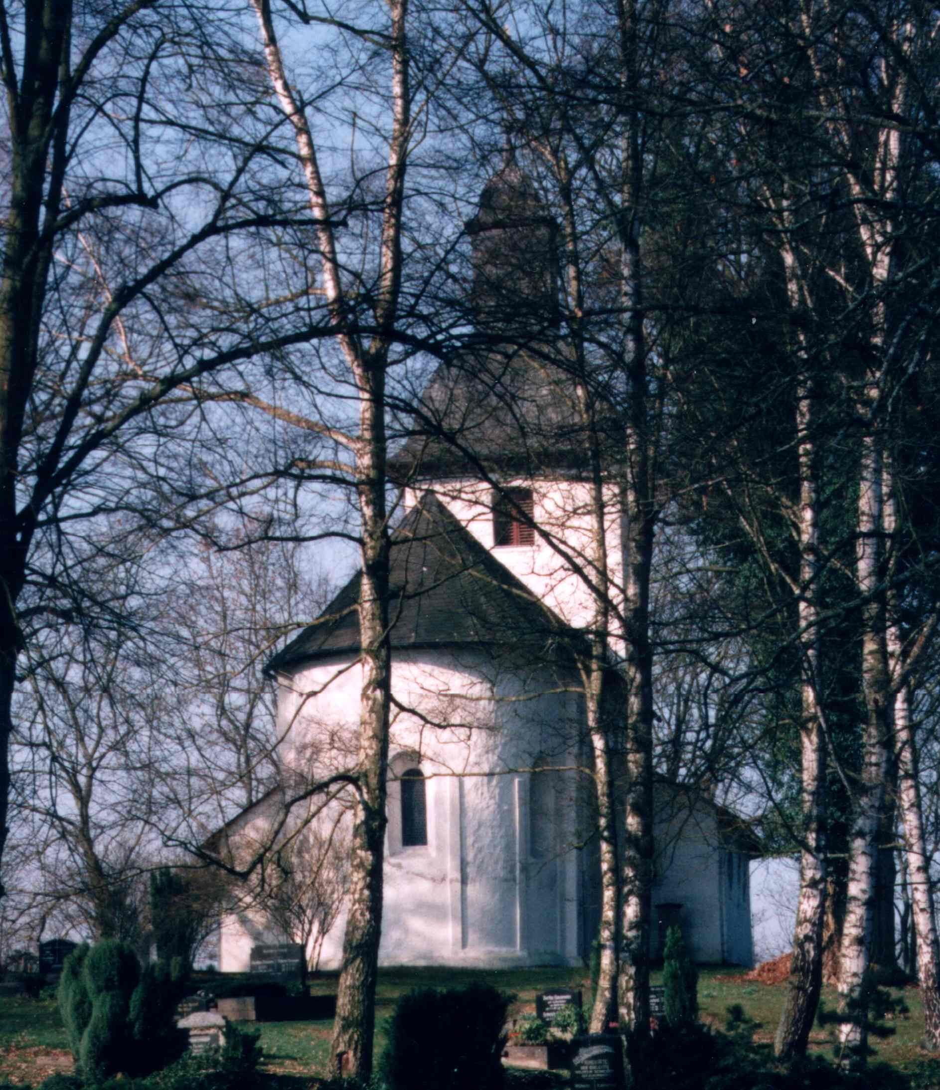 Bildbeschreibung: Ev. Kirche Almersbach Quelle: selbst fotographiert Fotograf/Zeichner: Gobel Datum: 31.10.2003